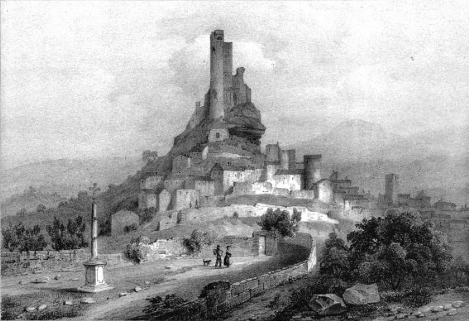 Album du Dauphiné - tome IV, litographie de Chamaret, près Grignan (Drome)